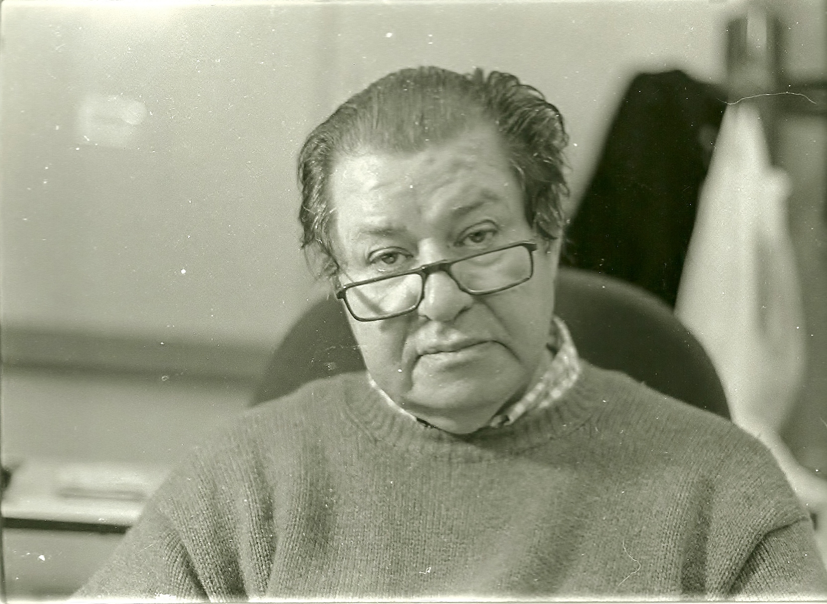 Giorgio Guazzotti nel suo studio di "Consulenze Teatrali" a Firenze nel 1994